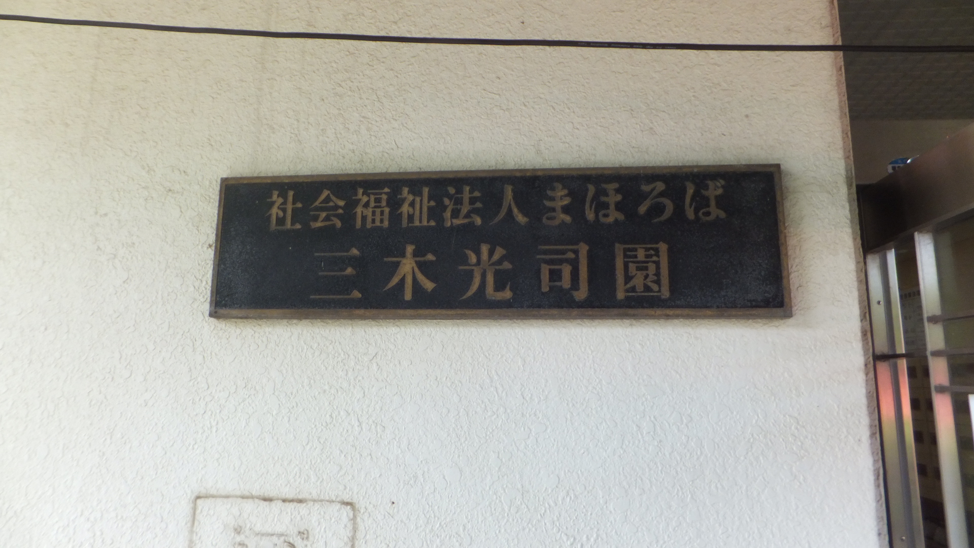 三木光司園（2014年5月18日）